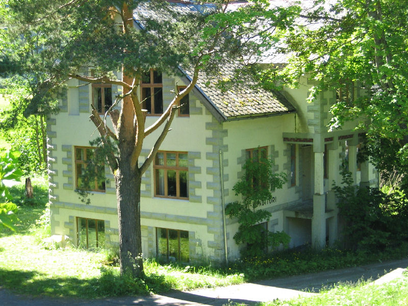 Schmidt-hus av Heinrich Schmidt. Det gamle bakeri i Stordal, Sunnmøre. Foto: Frode Inge Helland